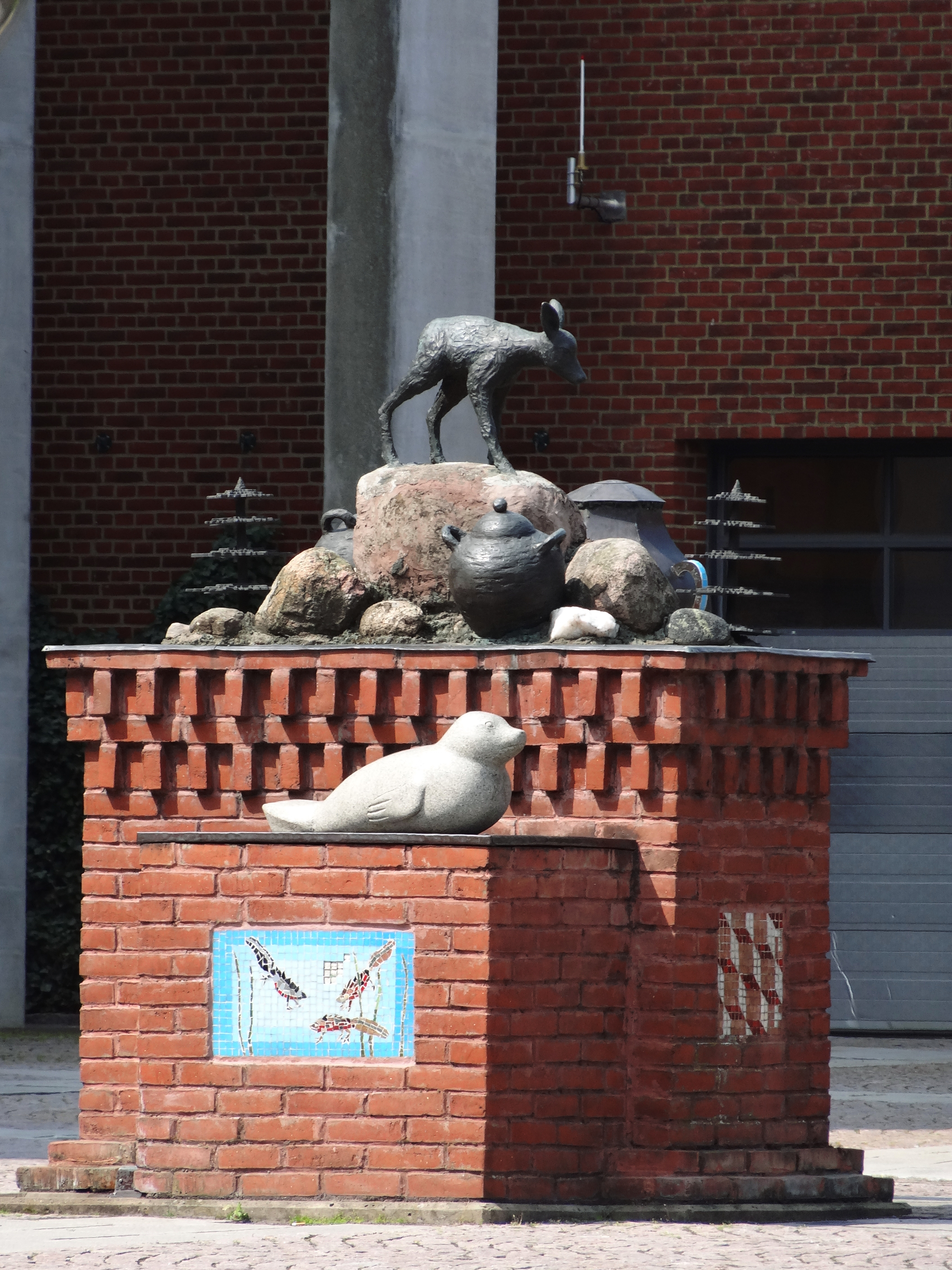 Mötesplats av Ernst Billgren. Sahlgrenska sjukhuset (framför akutentrén) i Göteborg.